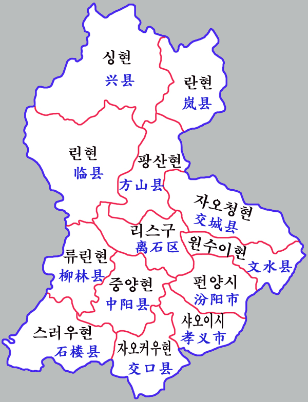 뤼량시 현급구역도